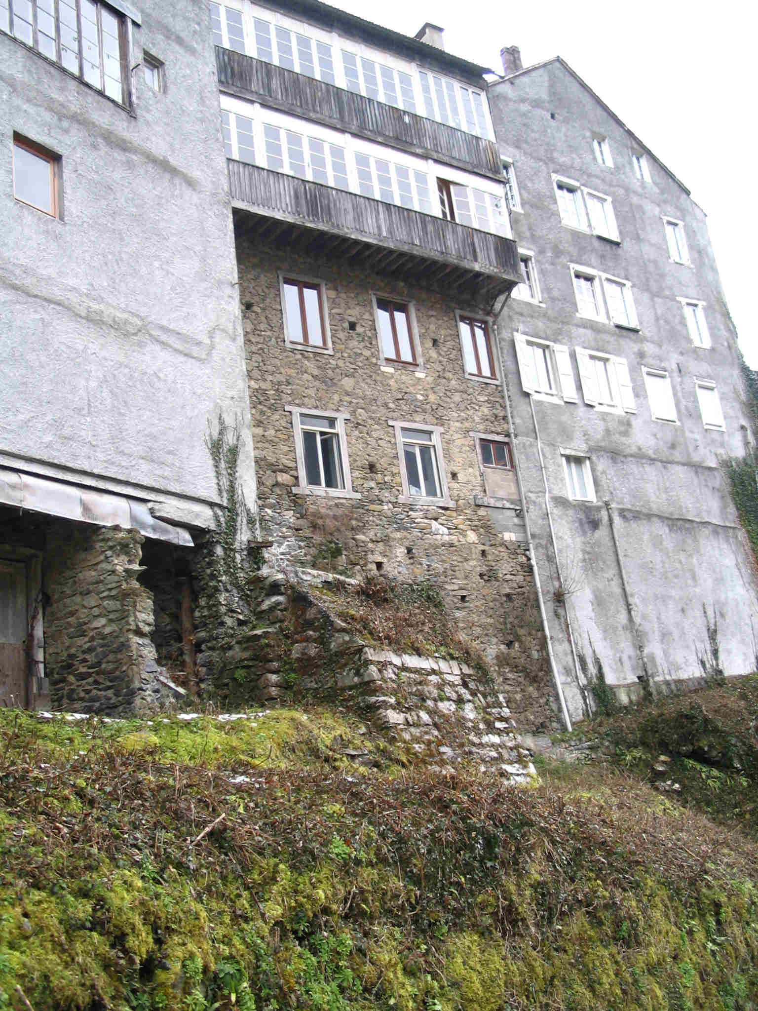 Eaux Bonnes (Pyrénées-Atlantiques, France) - Immeubles rue de la cascade - coté ravin.